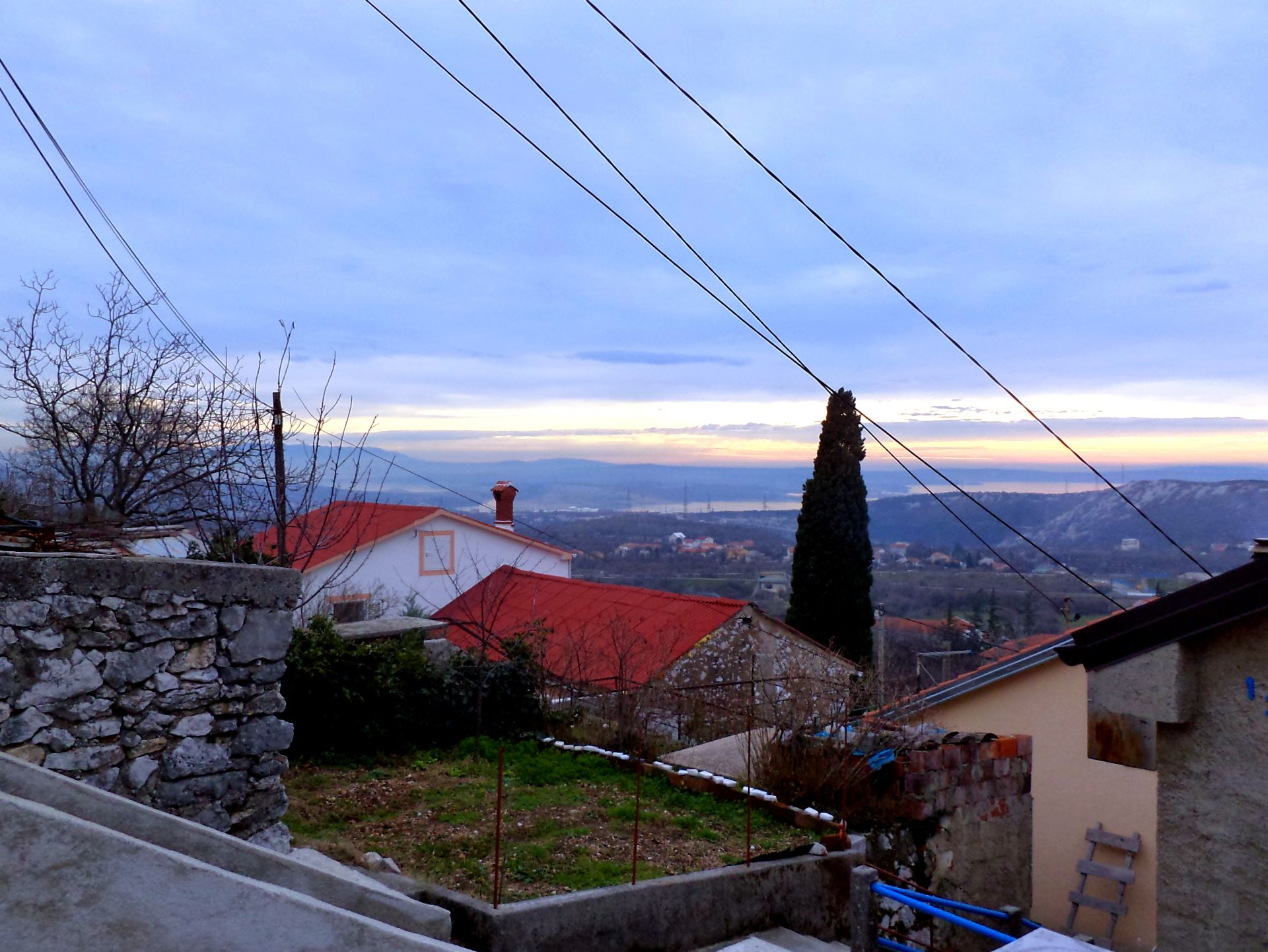 View of Kvarner (Krk), Kukuljanovo